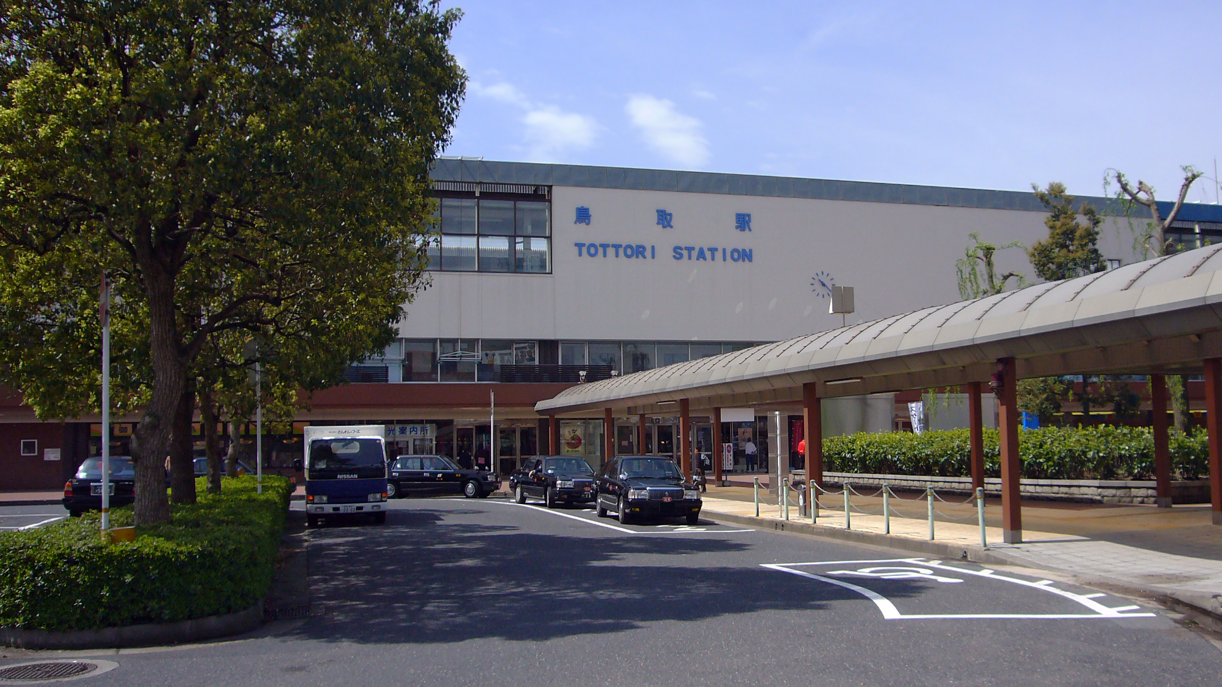 Tottori Station in Tottori, Tottori prefecture, Japan